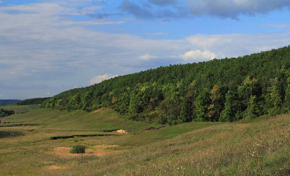 Склон Чарду: Располагается в 2,5 км западнее д. Еметкино и в 1 км севернее д. Бишево; кв. 23 Сотниковского (Тюрлеминского) участкового лесничества КУ «Мариинско-Посадское лесничество»,Козловский район, This image is related to the protected area of Russia number 2110075